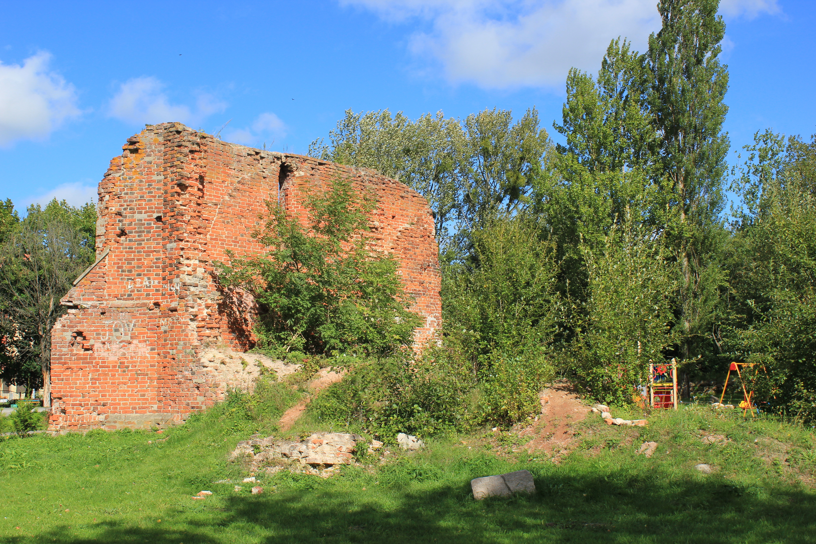 Kirchruine in Mamonowo (Heiligenbeil), Kaliningrader Oblast.